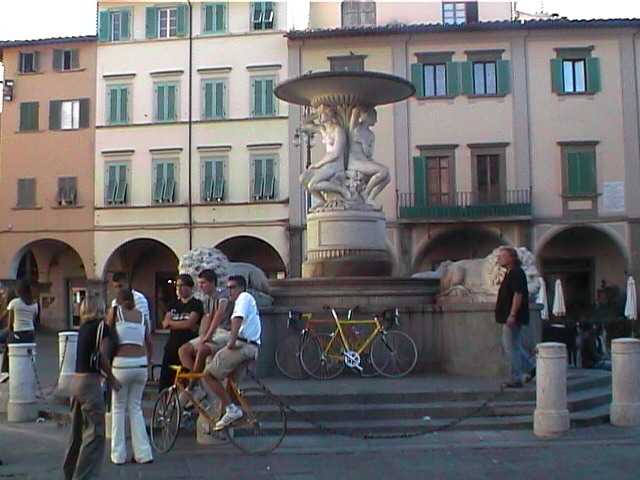 Piazza Farinata degli Uberti